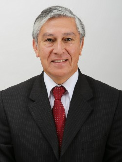 David Sandoval Plaza